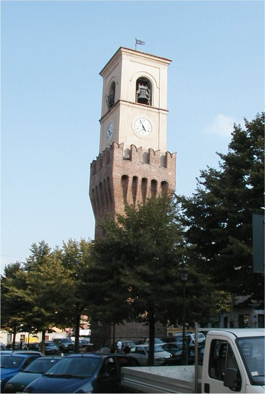 Stradella (Pavia) Torre Civica (Foto di Luigino C.)